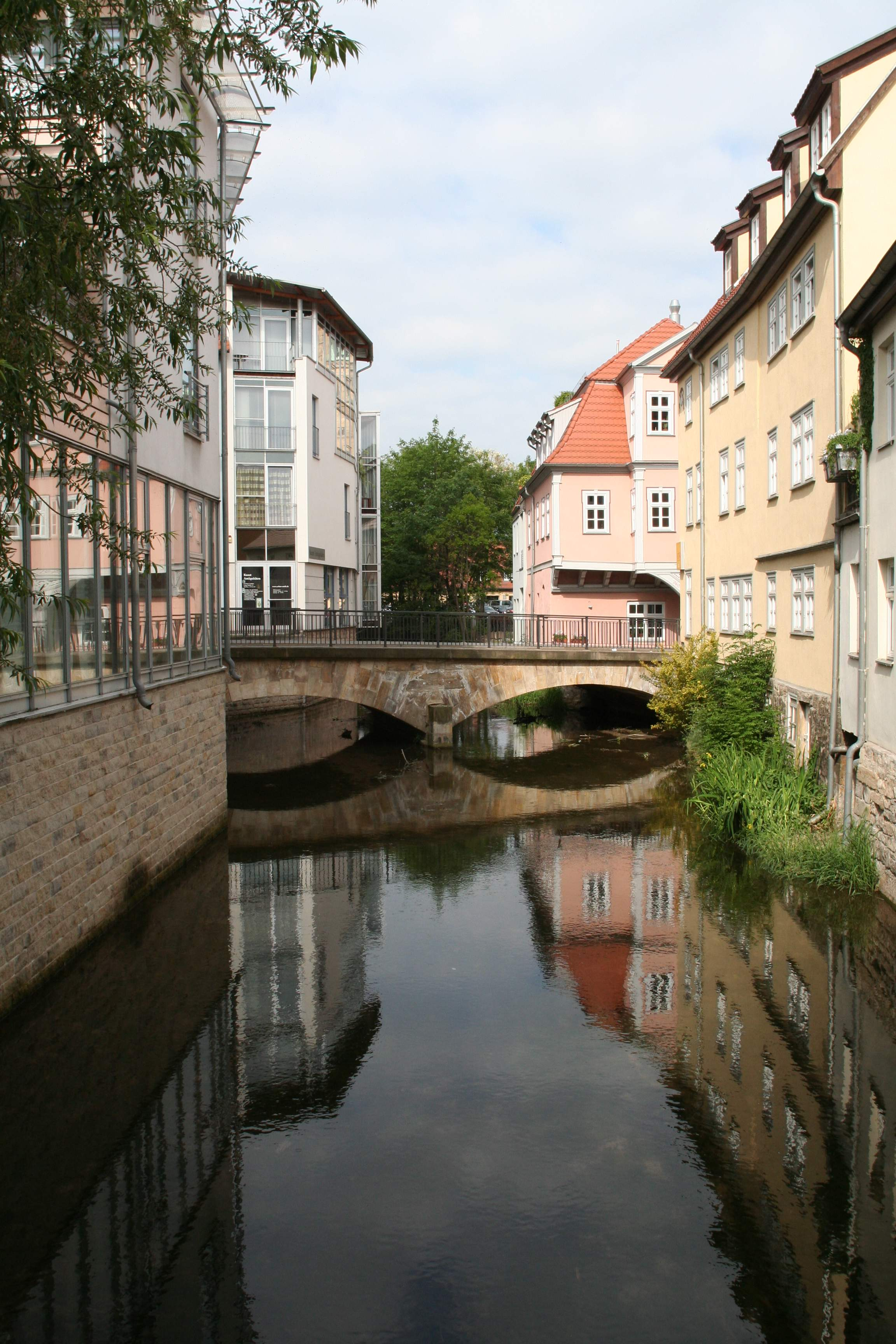 Lange Brücke (erste Erwähnung 1293) über Bergstrom in Erfurt